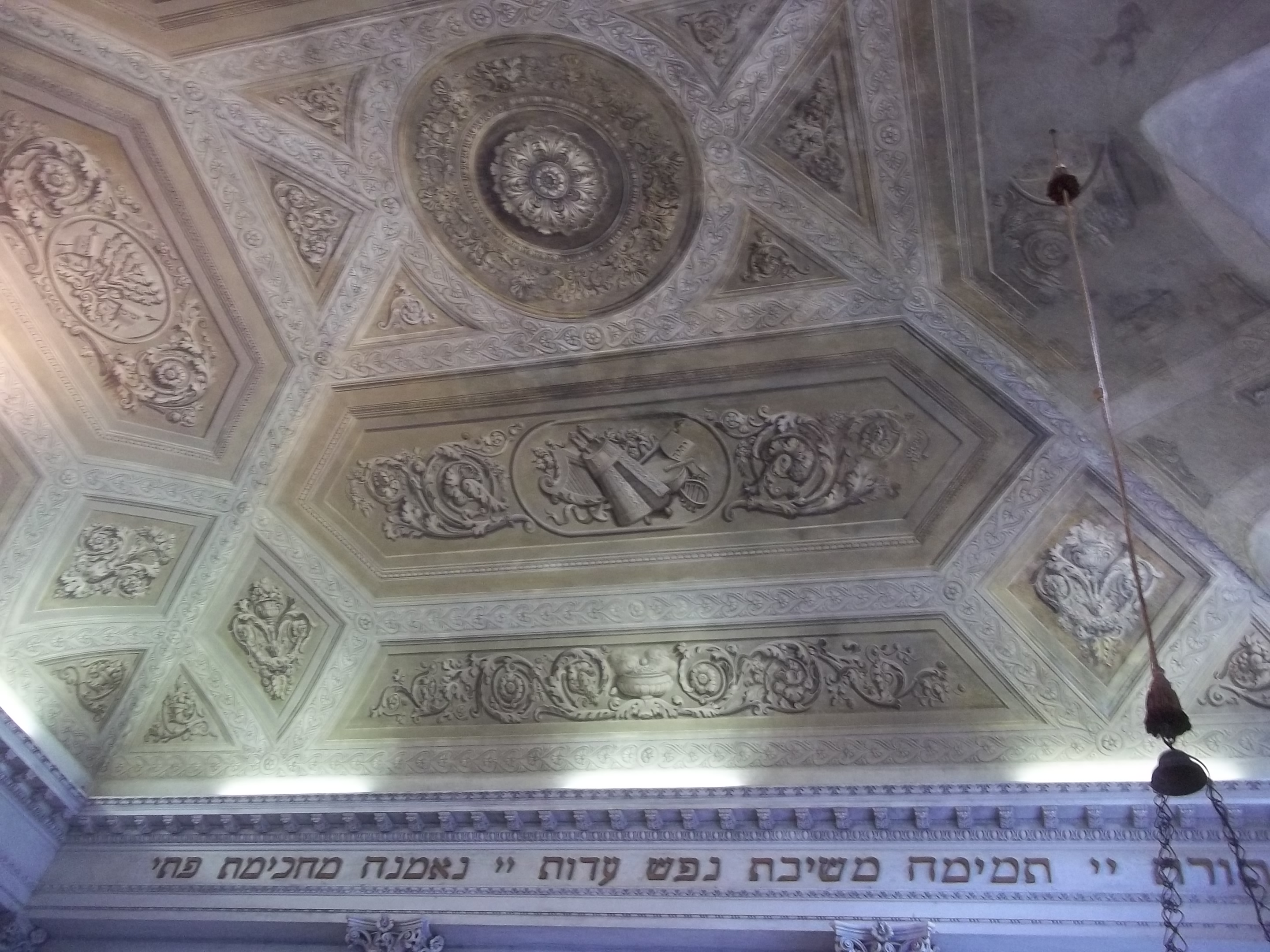 המוזיאון העברי על-שם פאוסט לוי בסוריאנה